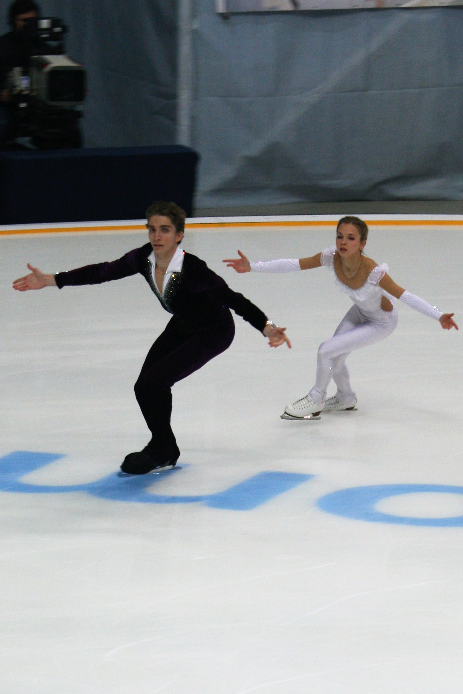 Алиса Ефимова / Александр Коровин на Кубке Ростелекома 2016.